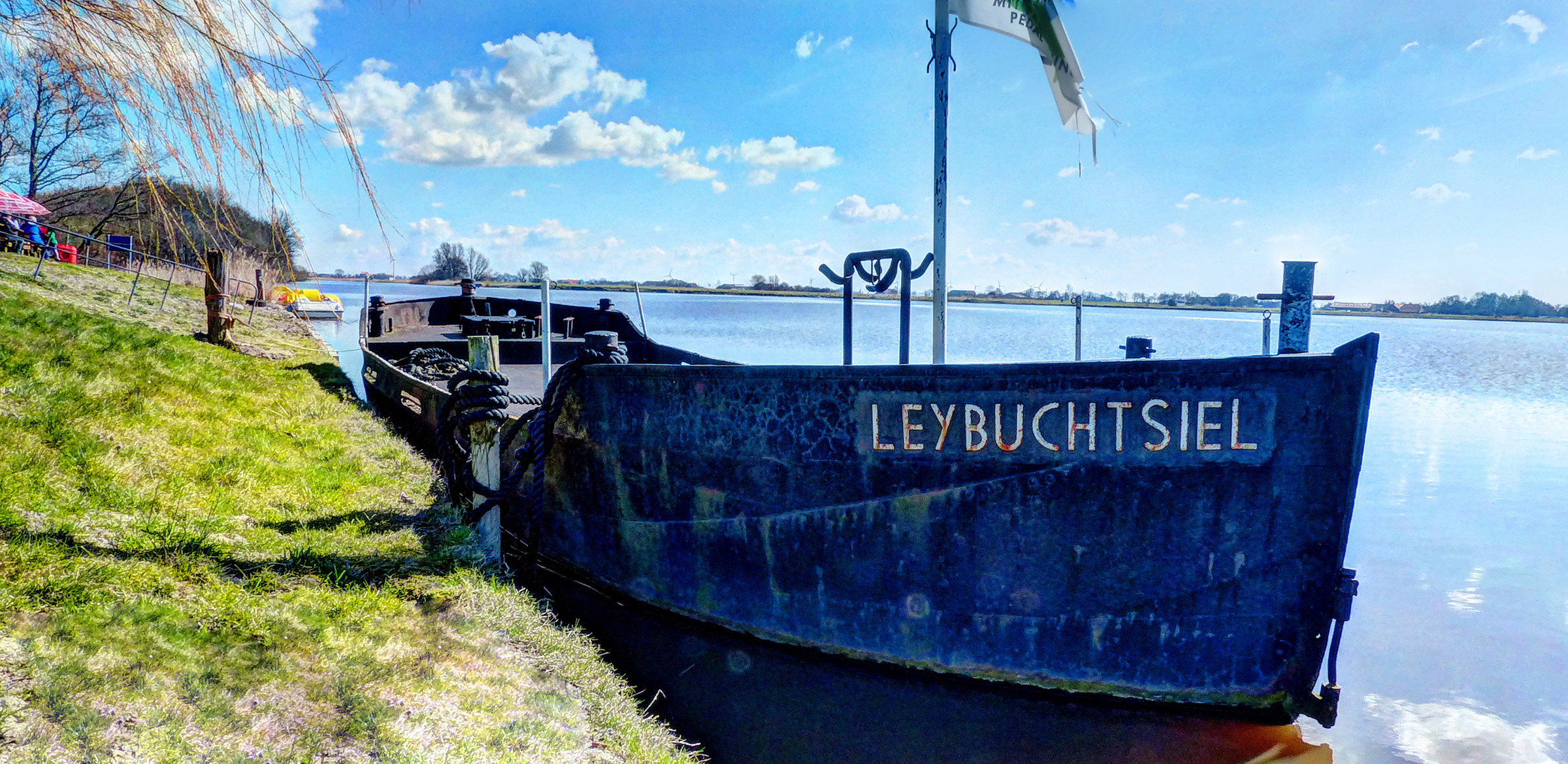 Alter Kahn, Leybuchtsiel zwischen Norden und Greetsiel im Nationalpark Niedersächsisches Wattenmeer